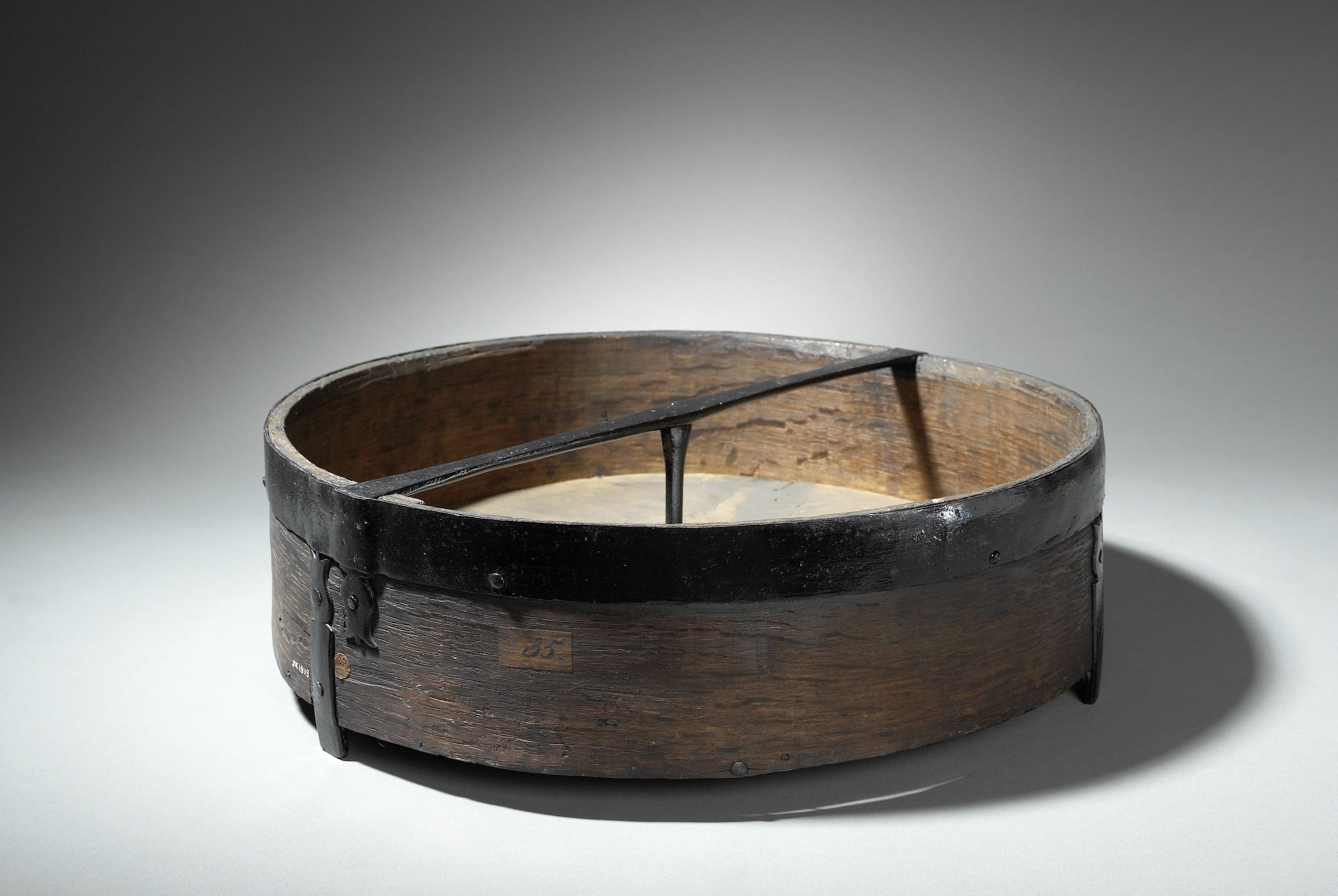 IdentificatieTitel(s): 1/4 Boisseau uit DeventerObjecttype: inhoudsmaat droge waren Objectnummer: NG-2001-16-A-19Opschriften / Merken: titel, etiket buitenzijde: ‘Deventer 1/4 Boisseau’ (gedeeltelijk)opschrift, etiket buitenzijde: ‘Van Deventer’nummer, etiket buitenzijde: ‘35’ijkmerk, binnenzijde bodem: ‘1800 / H 2’, In wapen 1800 Waar: onder teken (wapen van Deventer)opschrift, etiket binnenzijde: ‘Deventer / Een spint’datum, bovenrand wand: ‘1800’Omschrijving: Spanen inhoudsmaat met ijzeren beslag voor droge waren van 1/4 Boisseau met brug en stijl, v.z.v. merk en etiketten.VervaardigingVervaardiger: anoniemPlaats vervaardiging: DeventerDatering: 1800Materiaal: hout Afmetingen: h 13 cm. × d 44 cm. OnderwerpWanneer: 1780 - 1830WaarDeventerVerwerving en rechtenVerwerving: overdracht van beheer 26-nov-2001Copyright: Publiek domein